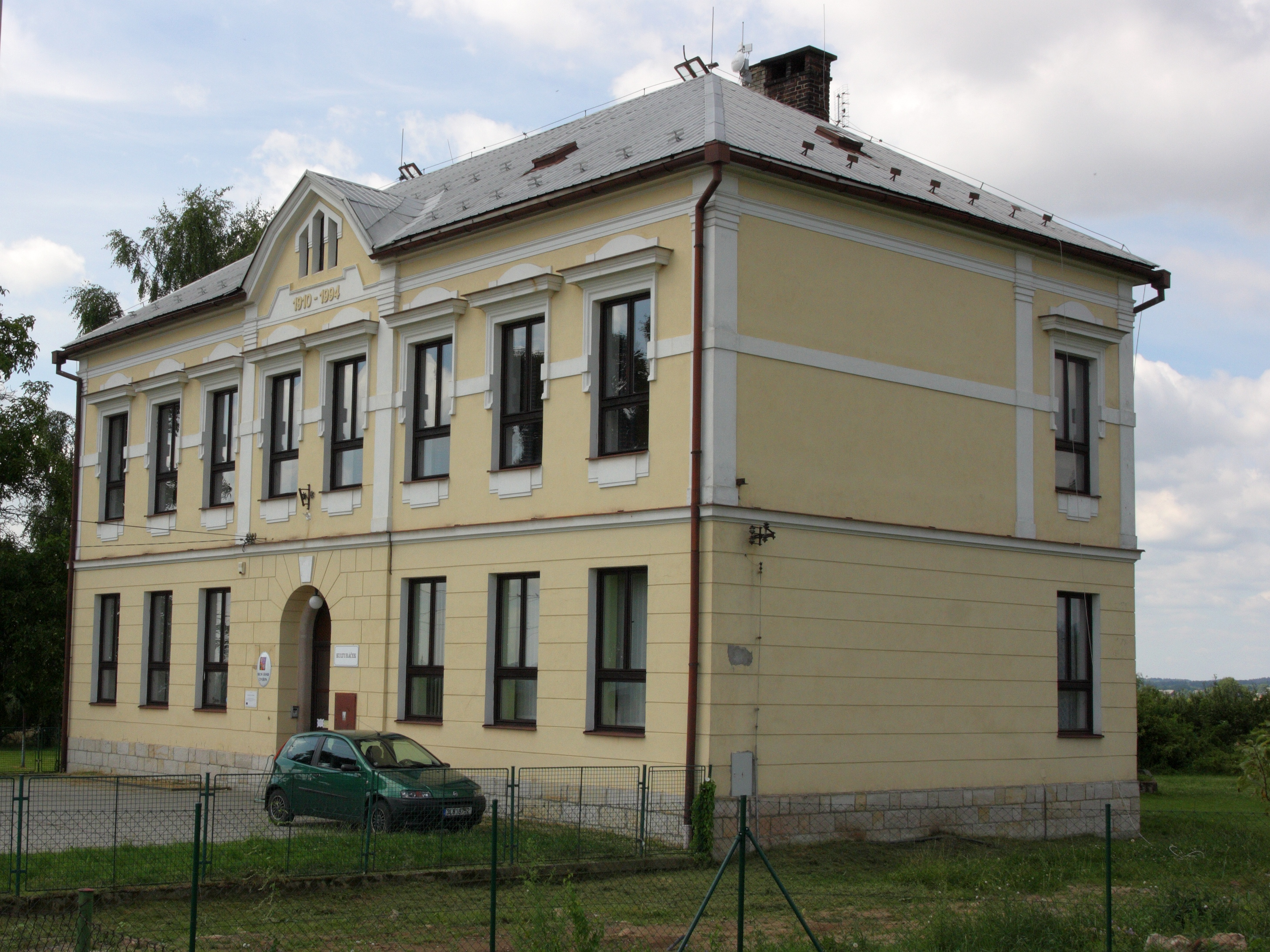 Čtveřín - bývalá škola, nyní obecní úřad.